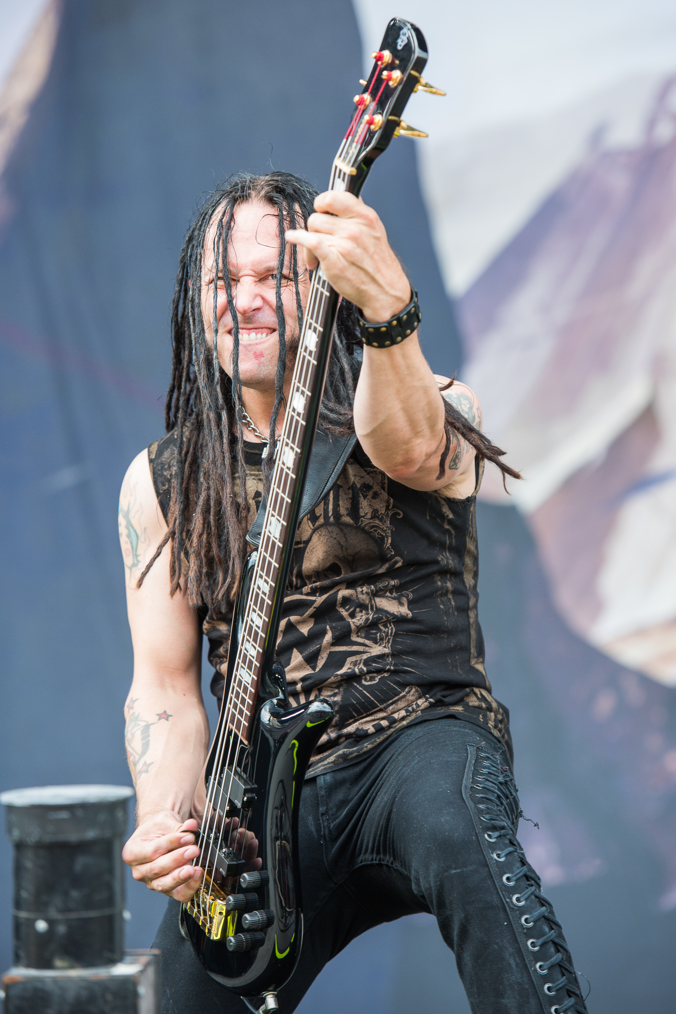 ARGO-Konzerte,Disturbed,Festival,John Moyer,Konzert,Livekonzert,Livemusik,Musik,RiP,Rock im Park 2016,Seat Zeppelin Stage